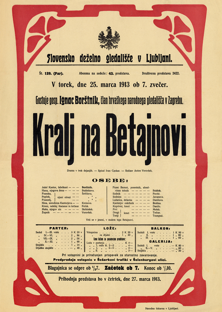 Plakat za predstavo Kralj na Betajnovi v Deželnem gledališču